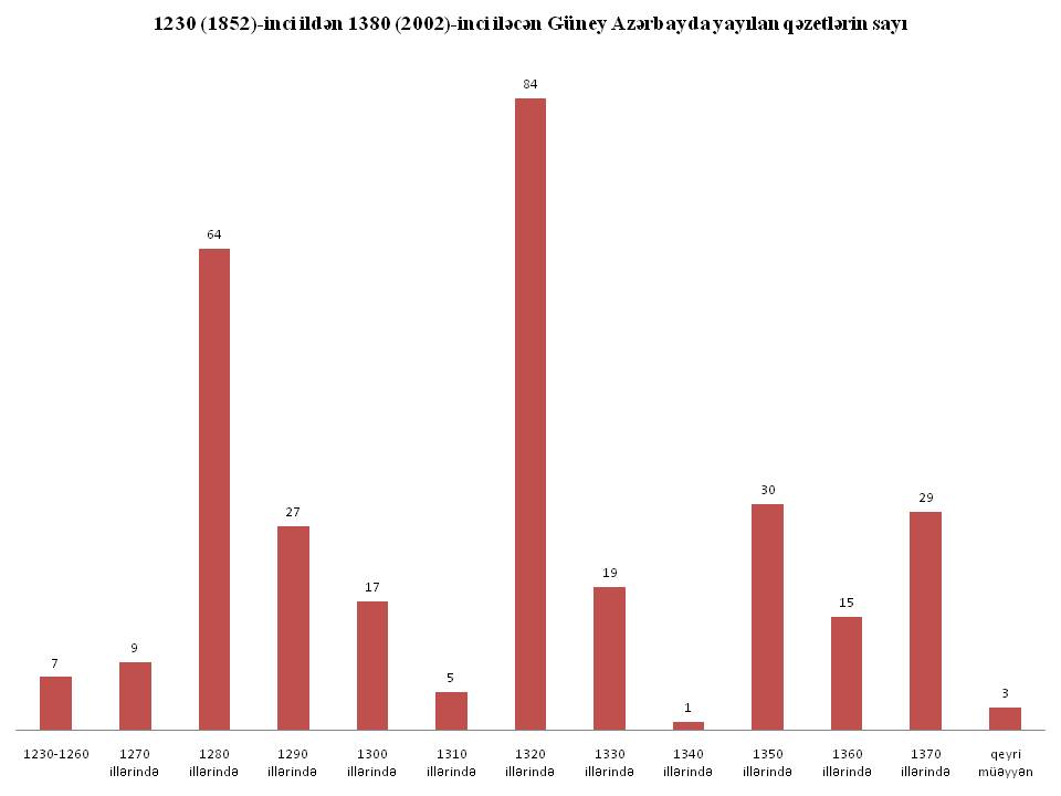 گونئی آزربایجان قزئتلری Jurnals of South Azerbayjan [1]